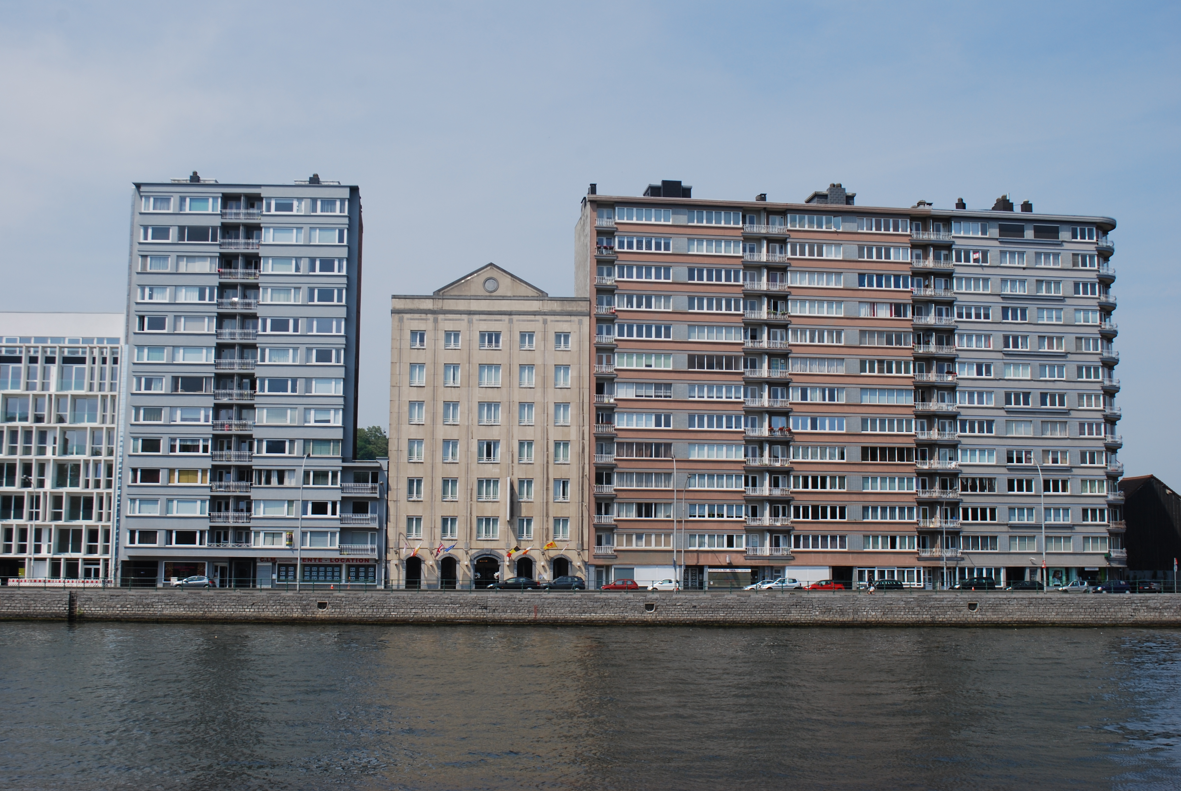 Vue des bords de Meuse à Liège, entre le pont Atlas et le pont Maghin.